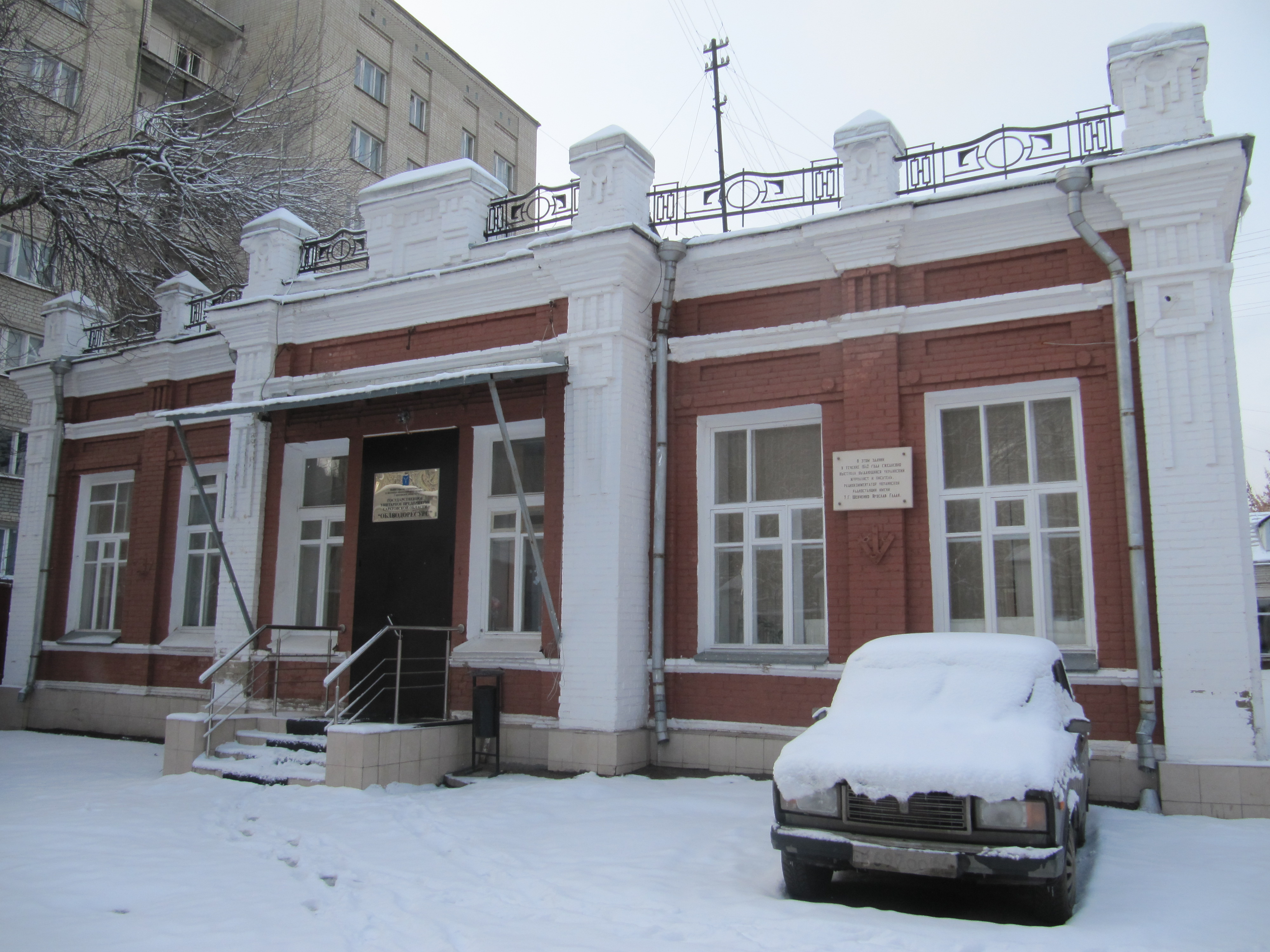 Провиантская ул. дом 21. Саратов